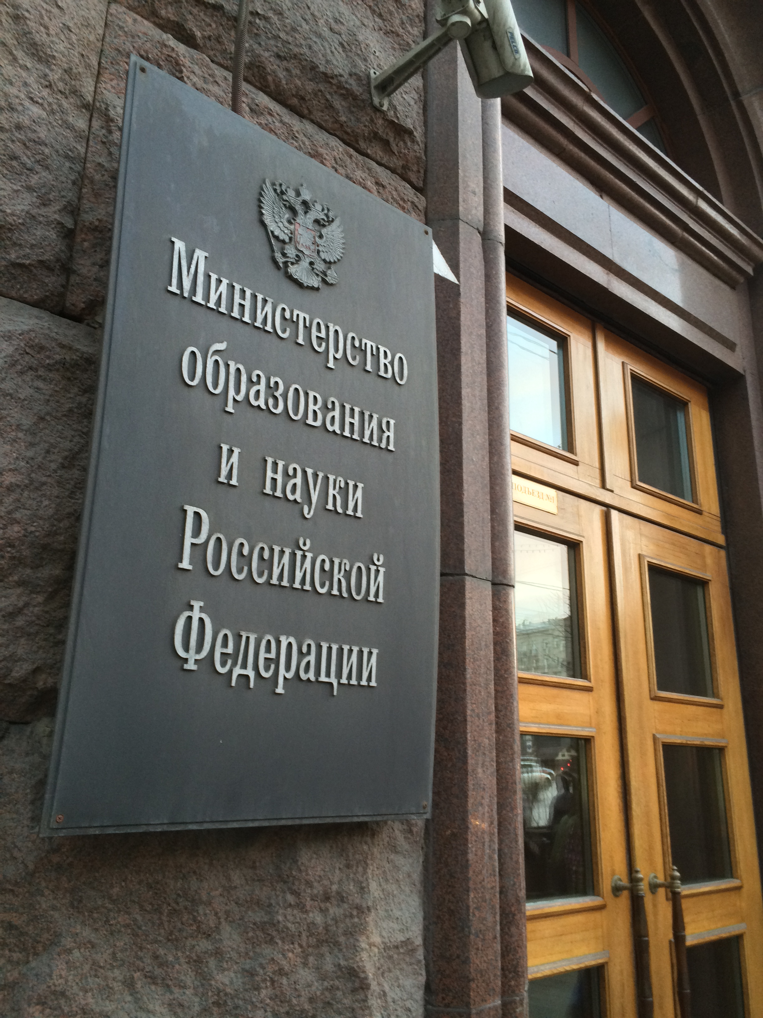 Министерство образования и науки Российской Федерации